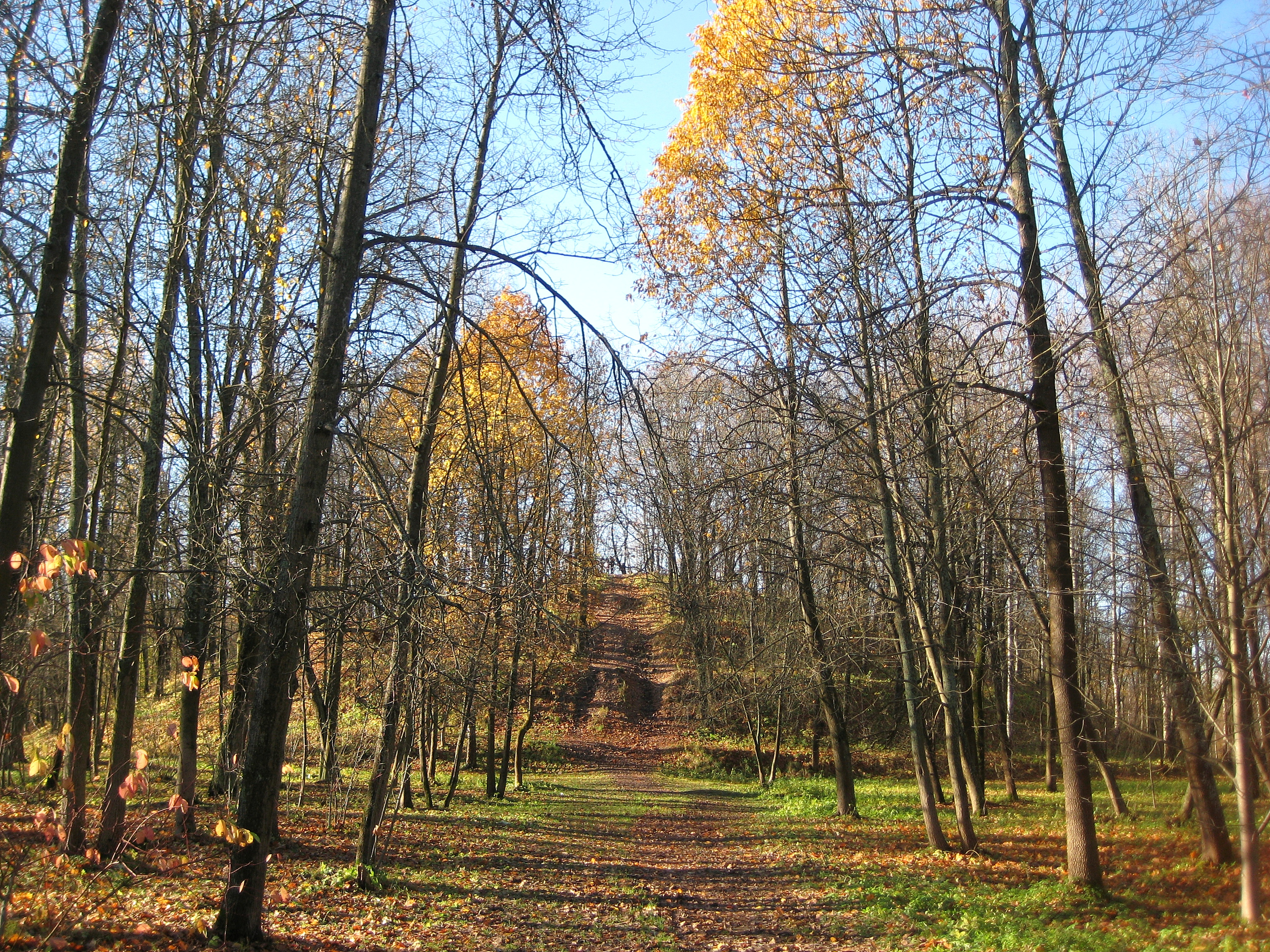 Пушкин (Царское Село). Александровский парк. Гора Парнас. Осень.